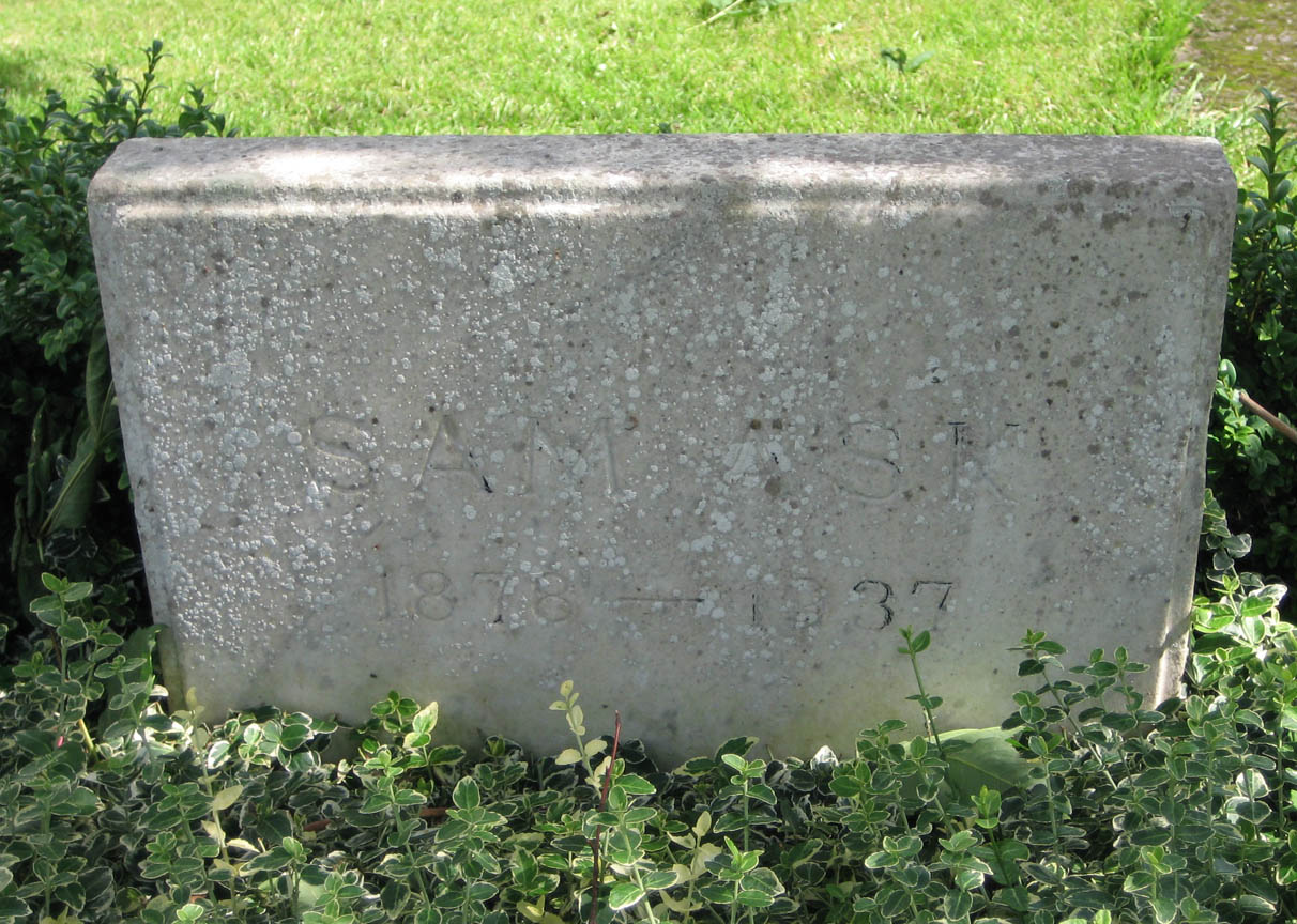 Sam Asks gravsten i Gråmanstorp, Klippans kommun, Skåne.